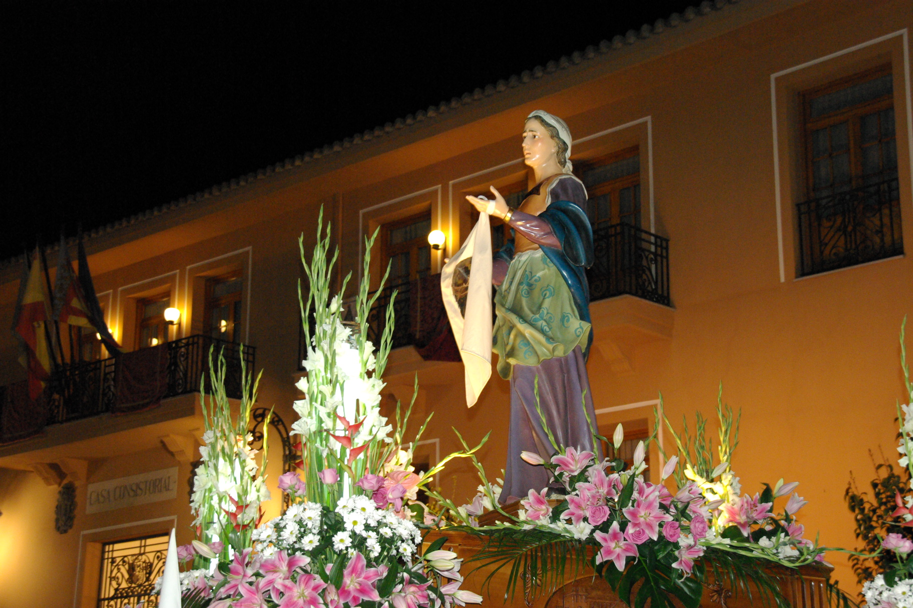 La Verónica de Requena